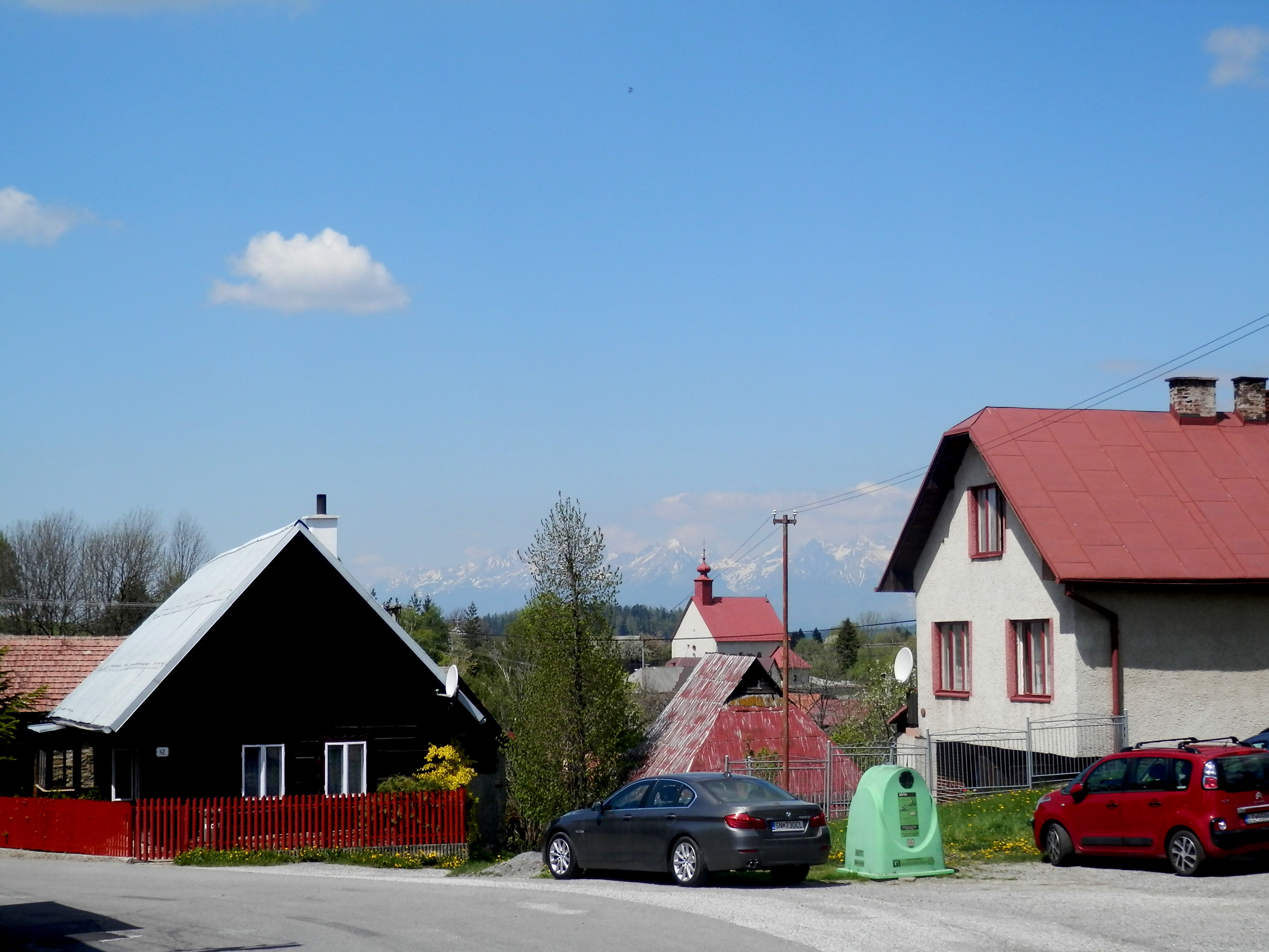 Obec Uloža, okres Levoča.V pozadí pohorie Vysoké Tatry.